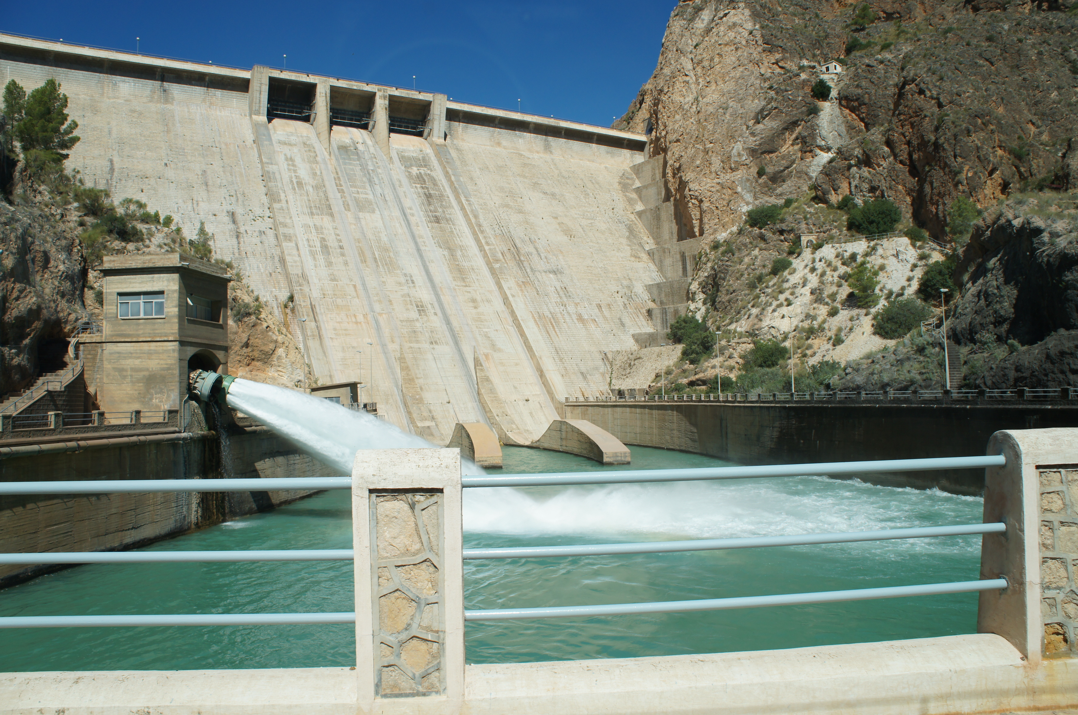 Diga del Cenajo sul río Segura, Spagna